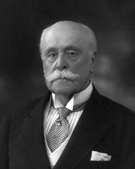 Sir William Henry Bennett